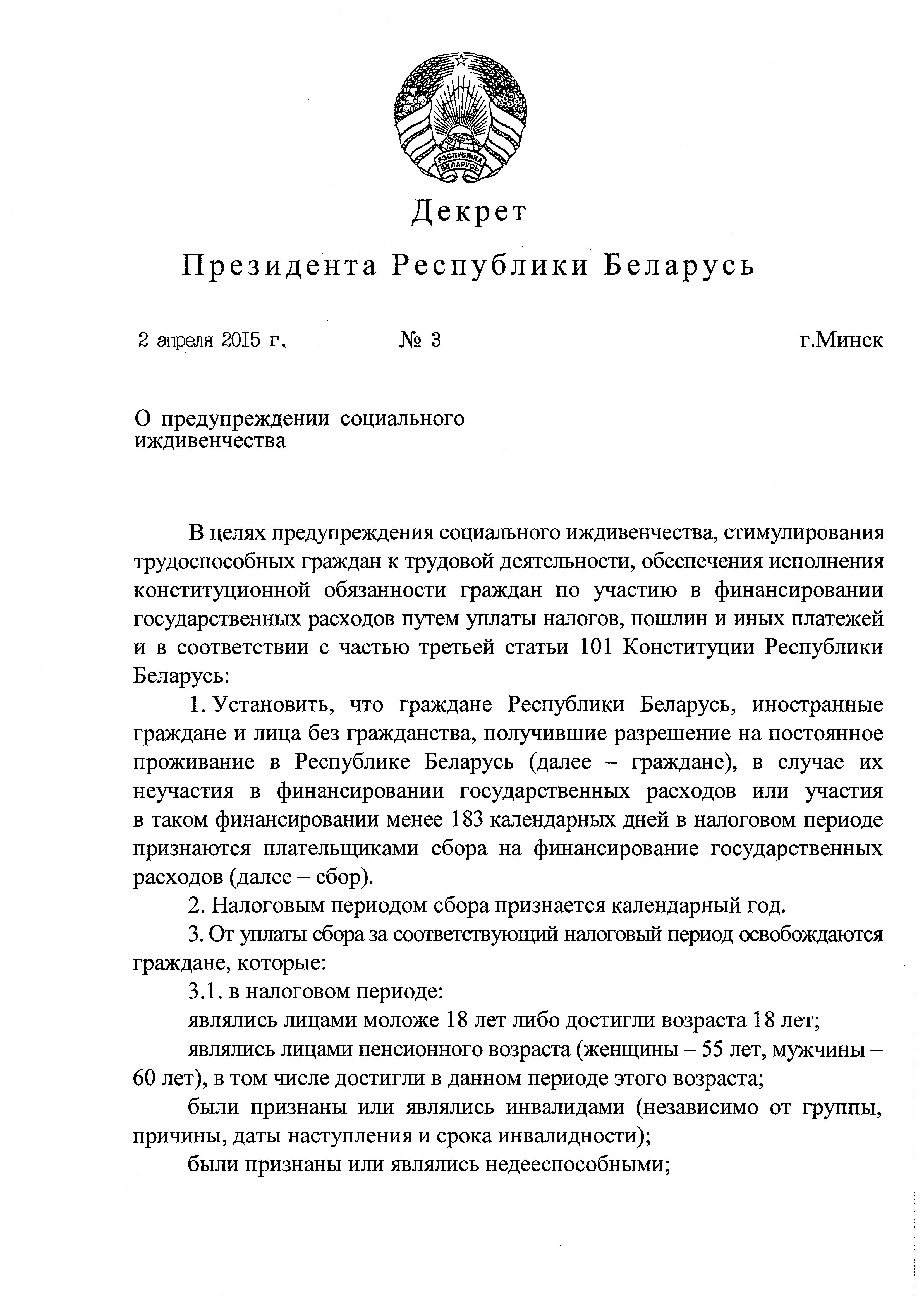 Декрет Президента Республики Беларусь №3 «О предупреждении социального иждивенчества»